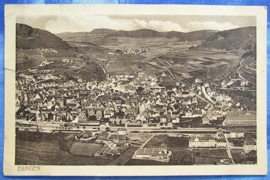 Ebingen, Luftaufnahme auf Postkarte.